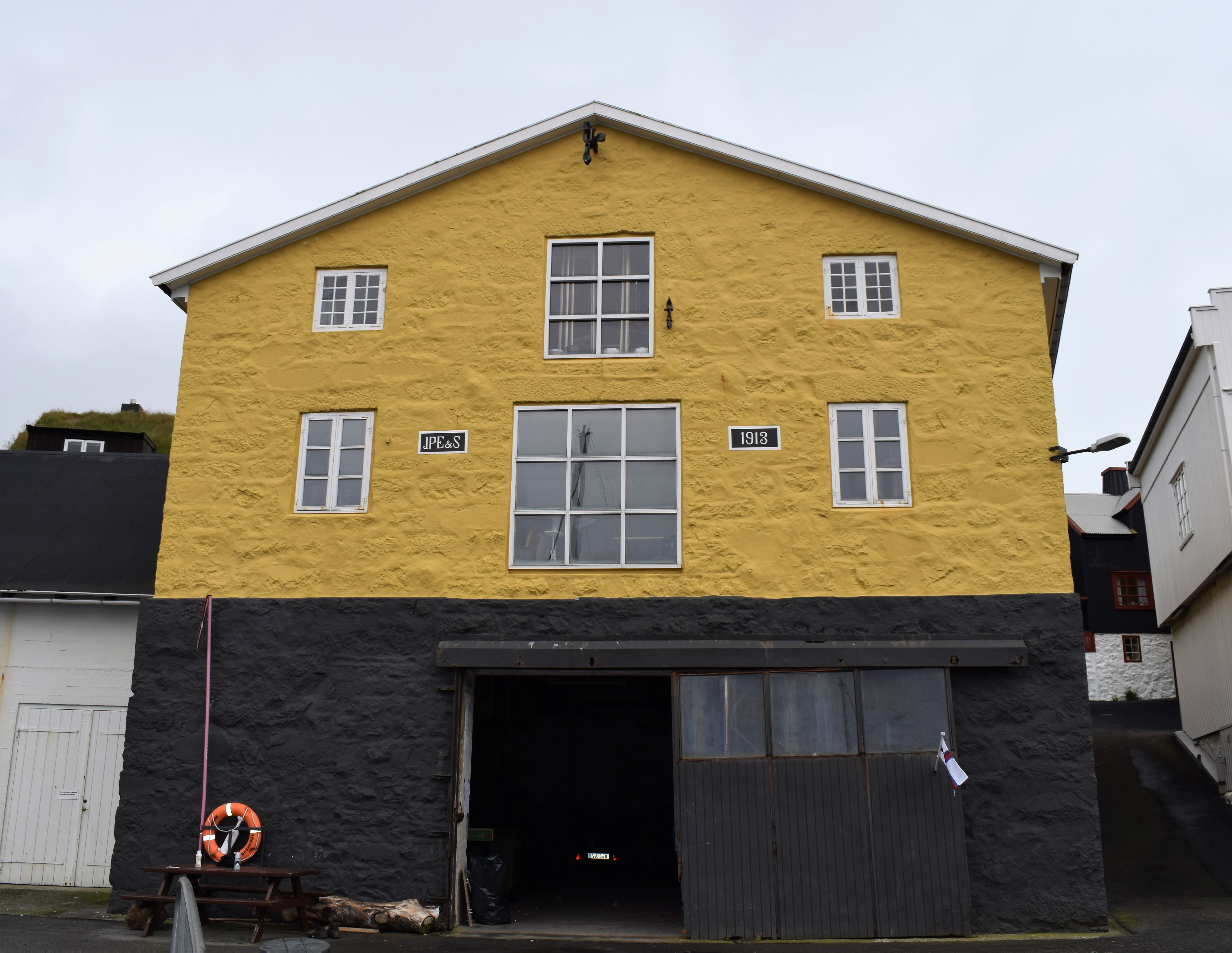 Føroyskt: Evensens pakkhús við Eystaravág í Tórshavn. Føroya Fornminnisavn: Fylgiskjal 20. Matr. nr. 13. Evensens pakkhús.